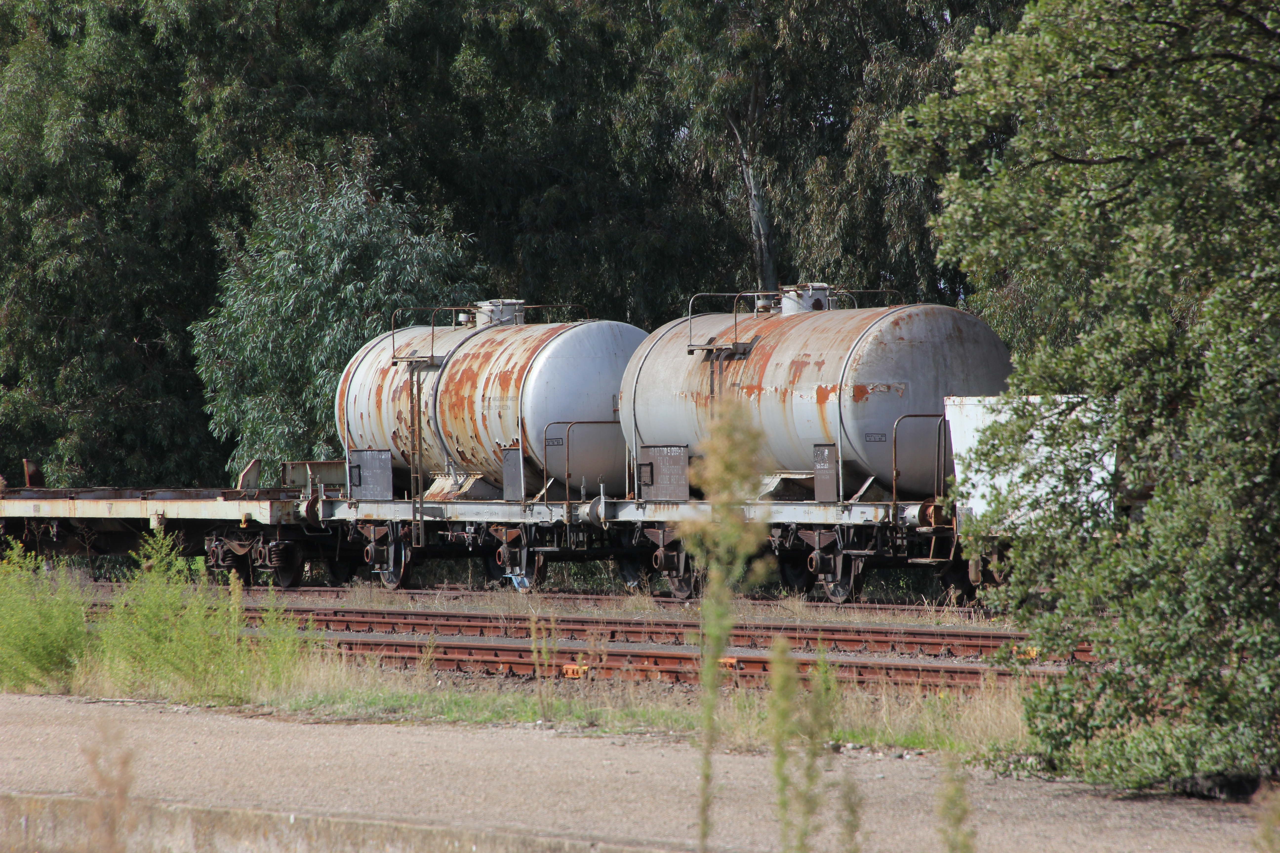 Ozieri - Stazione ferroviaria di Chilivani